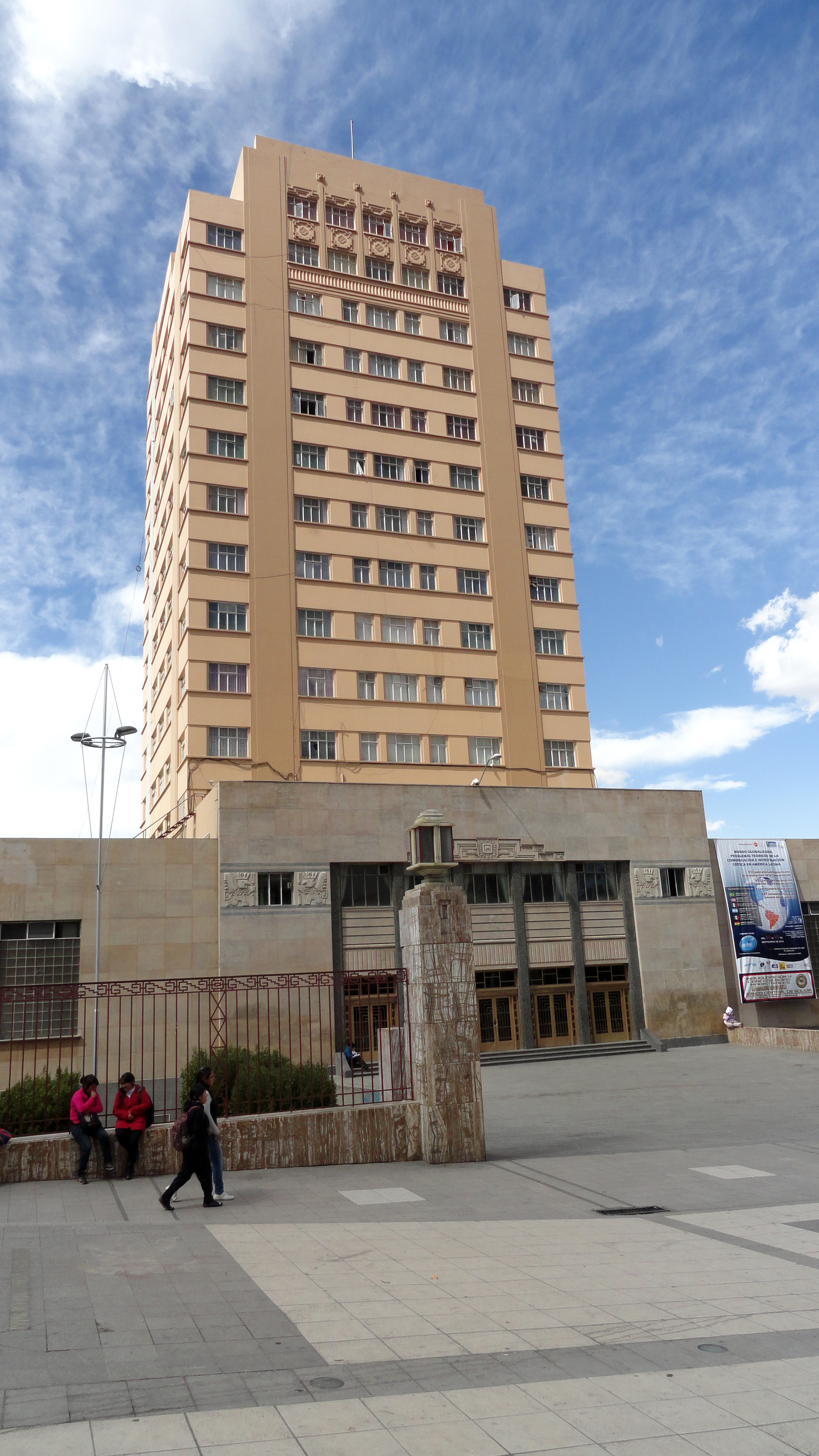 Universidad Mayor de San Andrés This medium shows the protected monument with the number L/00-136 in Bolivia.